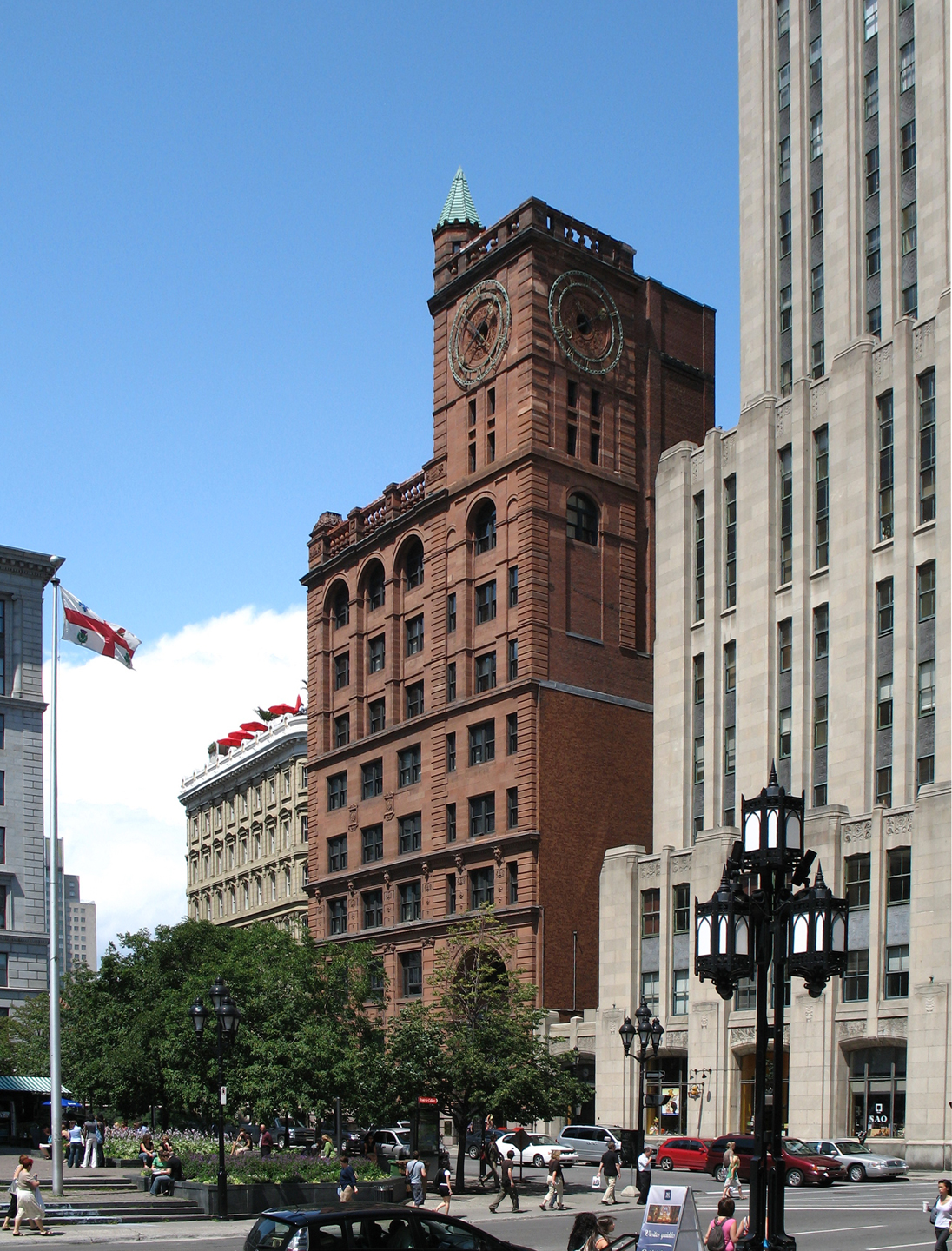 Place d'Armes, Montréal, Canada. La Place d’Armes, au centre duquel se trouve le monument d’un des fondateurs de la ville – Maisonneuve – est un lieu historique important.